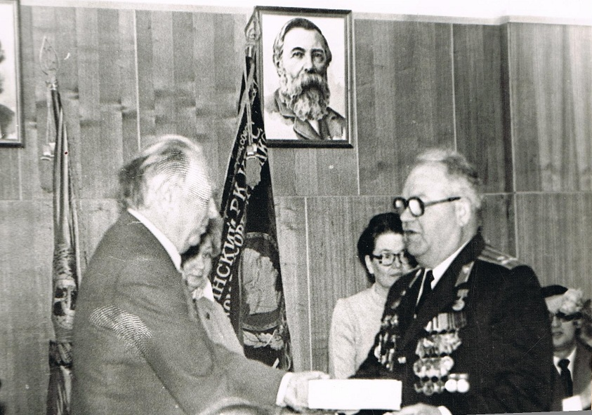 Академик С._В._Яковлев_и_Герой России Дорофеев_А._В._Москва_7.5._1985